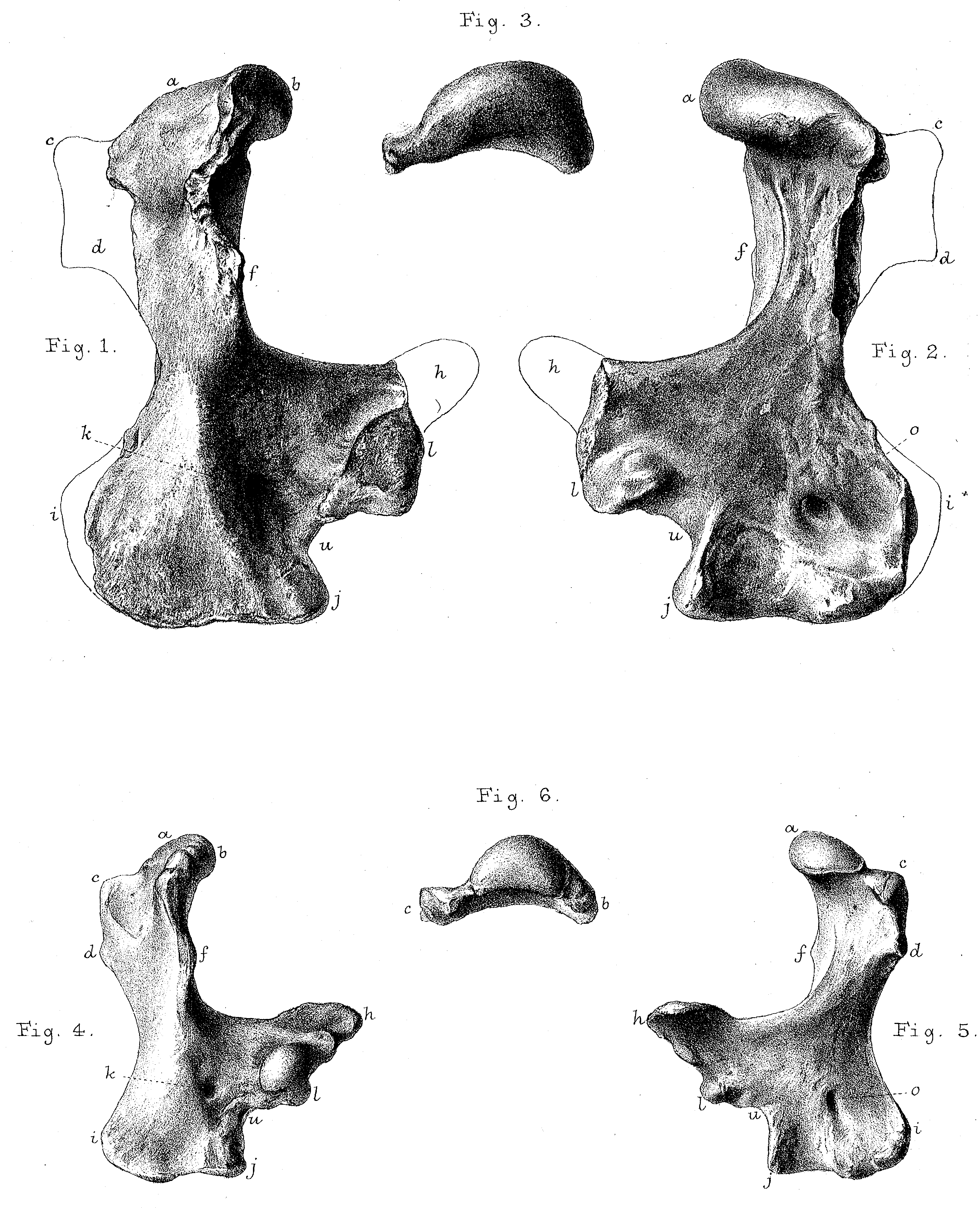 Humerus of Megalibgwilia (Echidna) ramsayi.